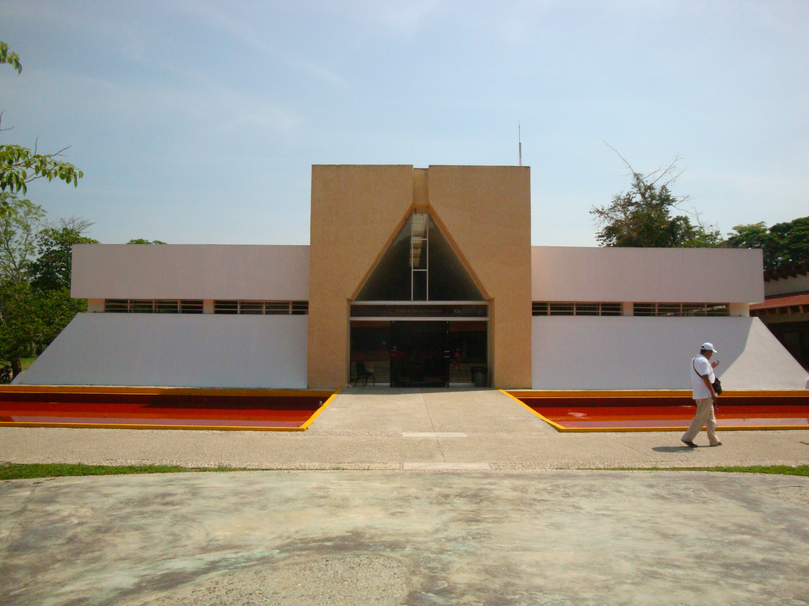 Fachada del Museo de Sitio de la zona arqueológica de Comalcalco, Tabasco, México.